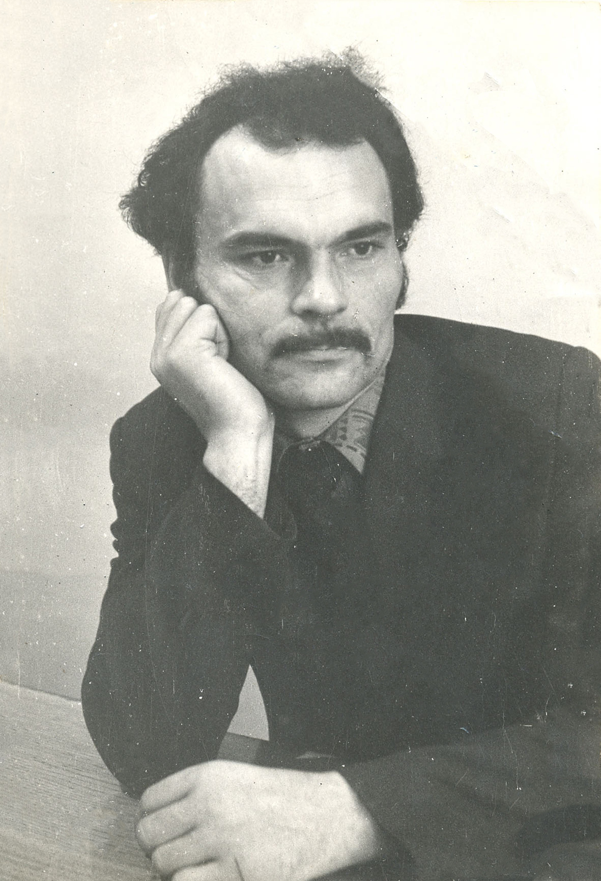 Иван Стадольник в 1980 году